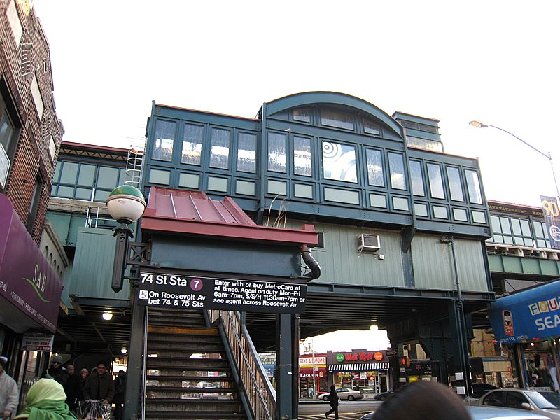 Estación de la línea 7 del metro de New York, en New York.